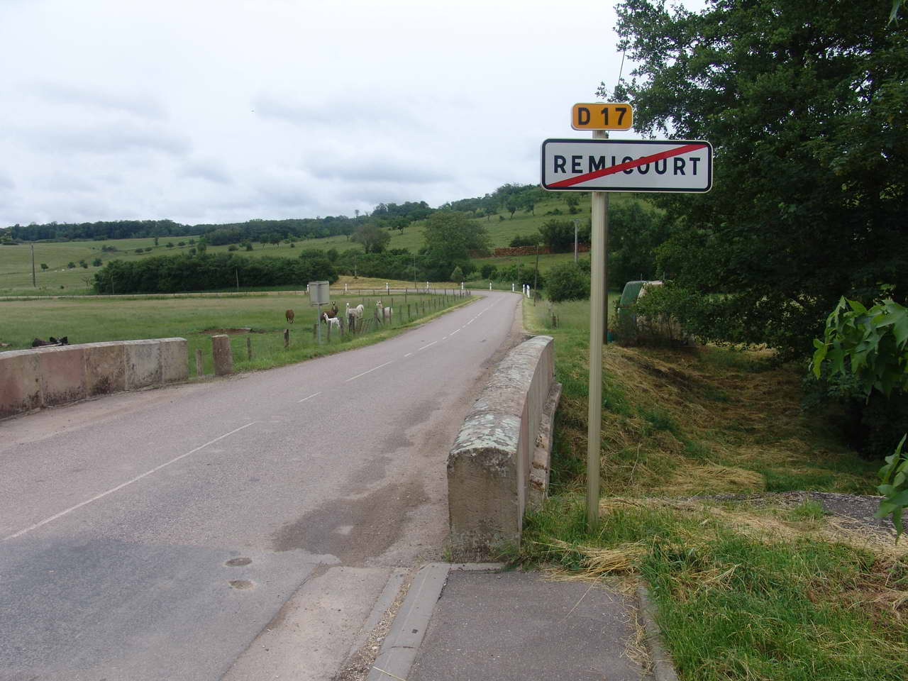 Le village de Remicourt dans les Vosges